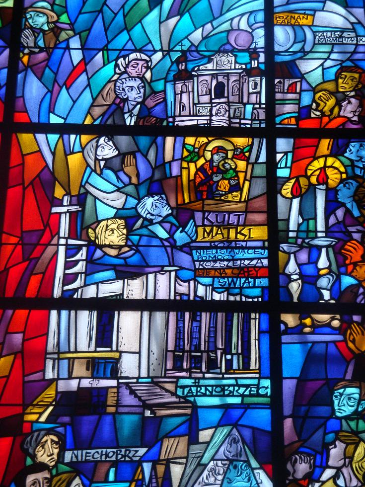 Kościół Matki Bożej Nieustającej Pomocy w Tarnobrzegu-Serbinowie